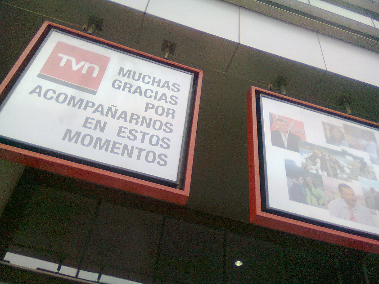 Carteles instalados en la fachada de Televisión Nacional de Chile en agradecimiento a las demostraciones de afecto del público luego de que un equipo del matinal Buenos días a todos, liderado por el animador Felipe Camiroaga, falleciera en un accidente aéreo en el archipiélago Juan Fernández el 2 de septiembre de 2011. Bellavista 0990, Providencia, Santiago de Chile, 8 de septiembre de 2011.